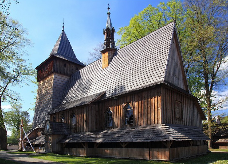 Harklowa (powiat nowotarski). Kościół parafialny Narodzenia Najświętszej Marii Panny